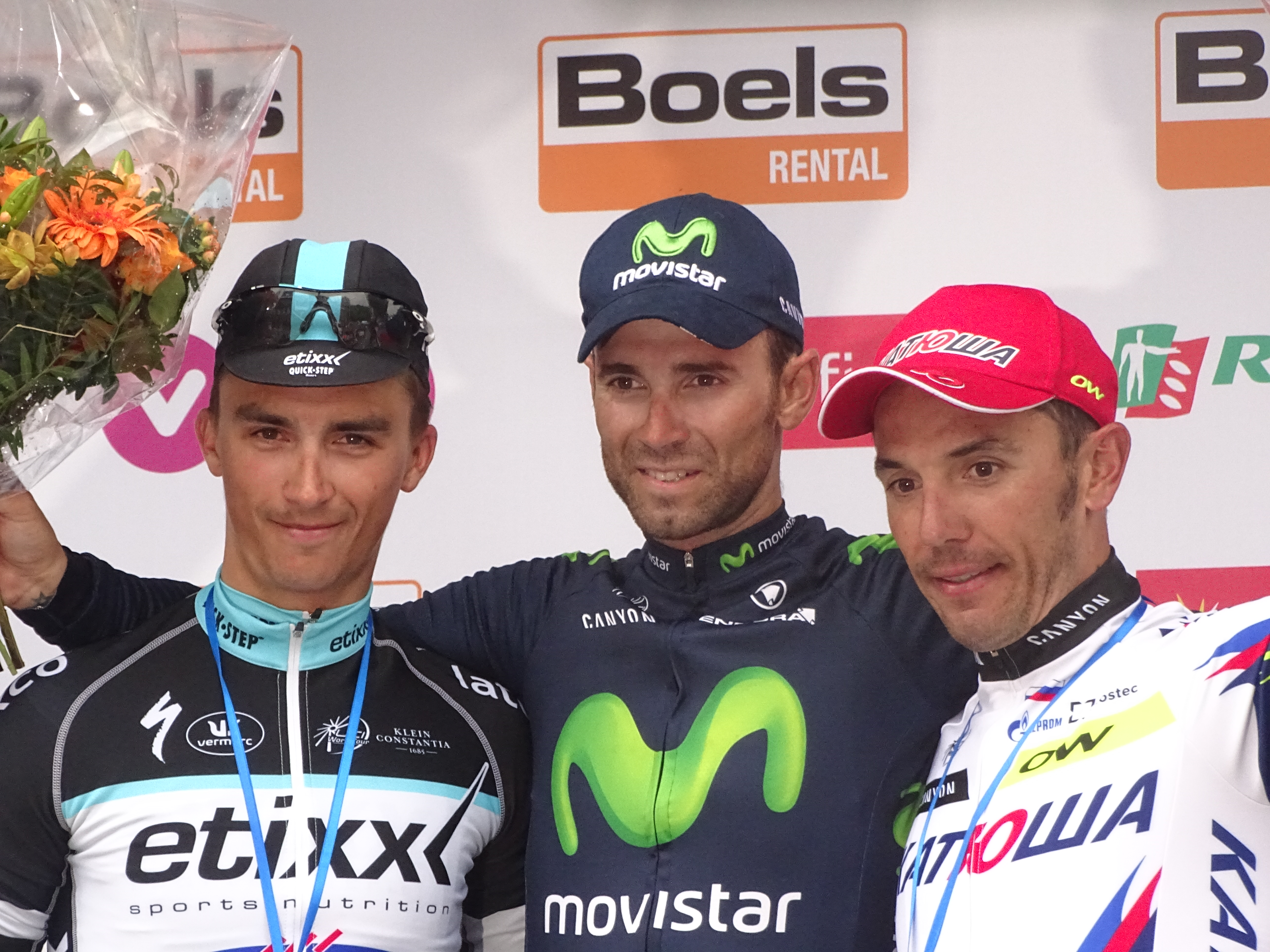 Reportage réalisé le dimanche 26 avril à l'occasion de l'arrivée de Liège-Bastogne-Liège 2015 à Ans, Belgique.